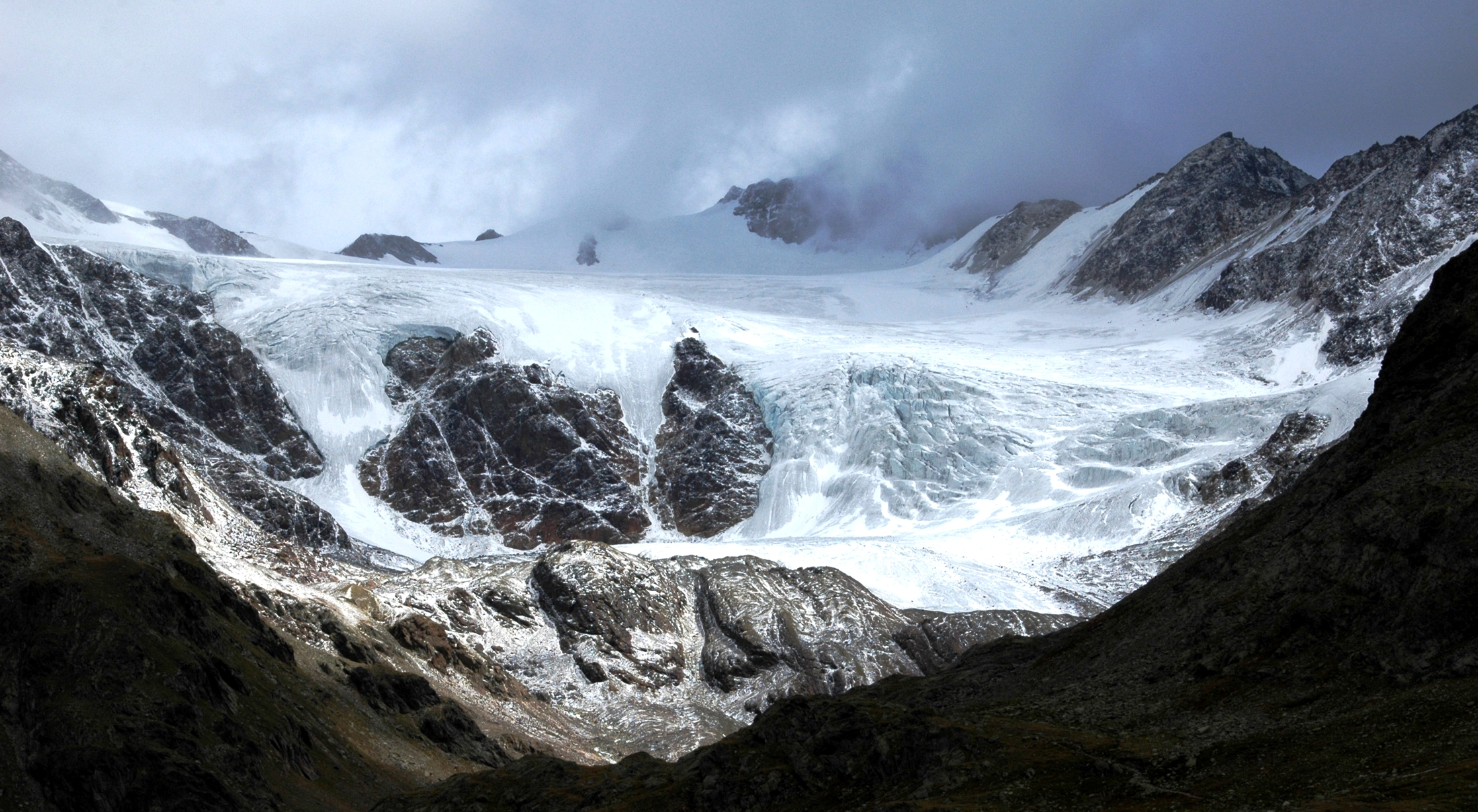 Gletscher Vedretta di Dosegu gesehen vom Gavia-Pass, 2621m